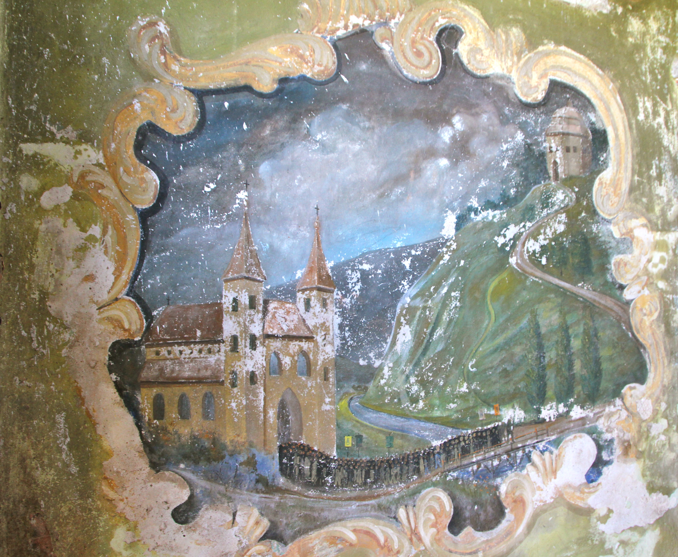 Głogowiec wieś w Polsce położona w województwie opolskim, w powiecie prudnickim, w gminie Głogówek.